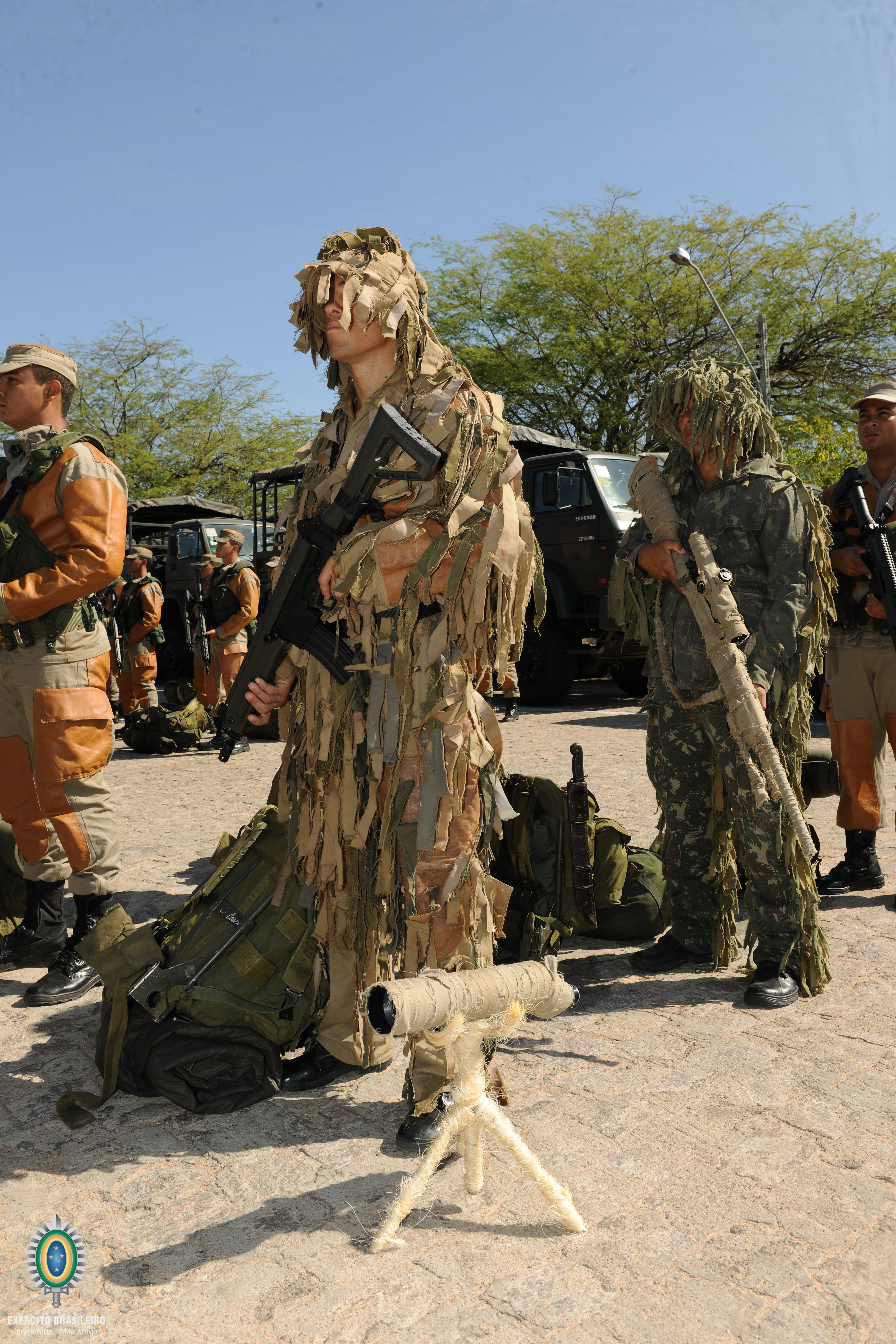 Foto: Ten Edvaldo/EB